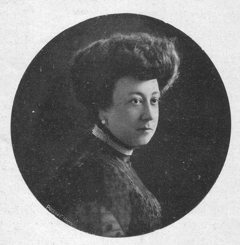 Ida Aquilecchia Mango